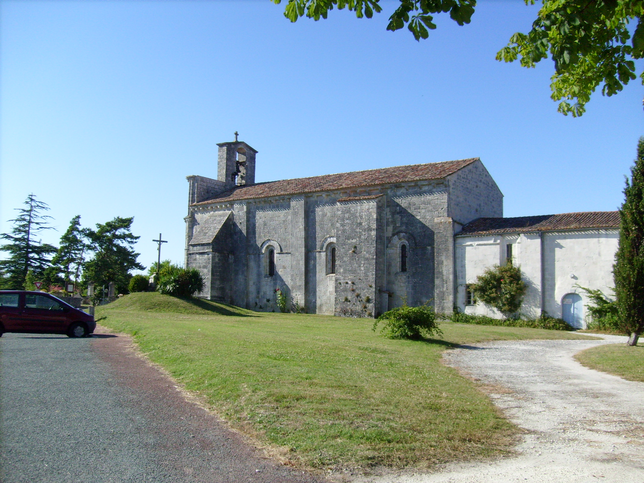 L'église de Breuillet, vue depuis une des entrées du bourg